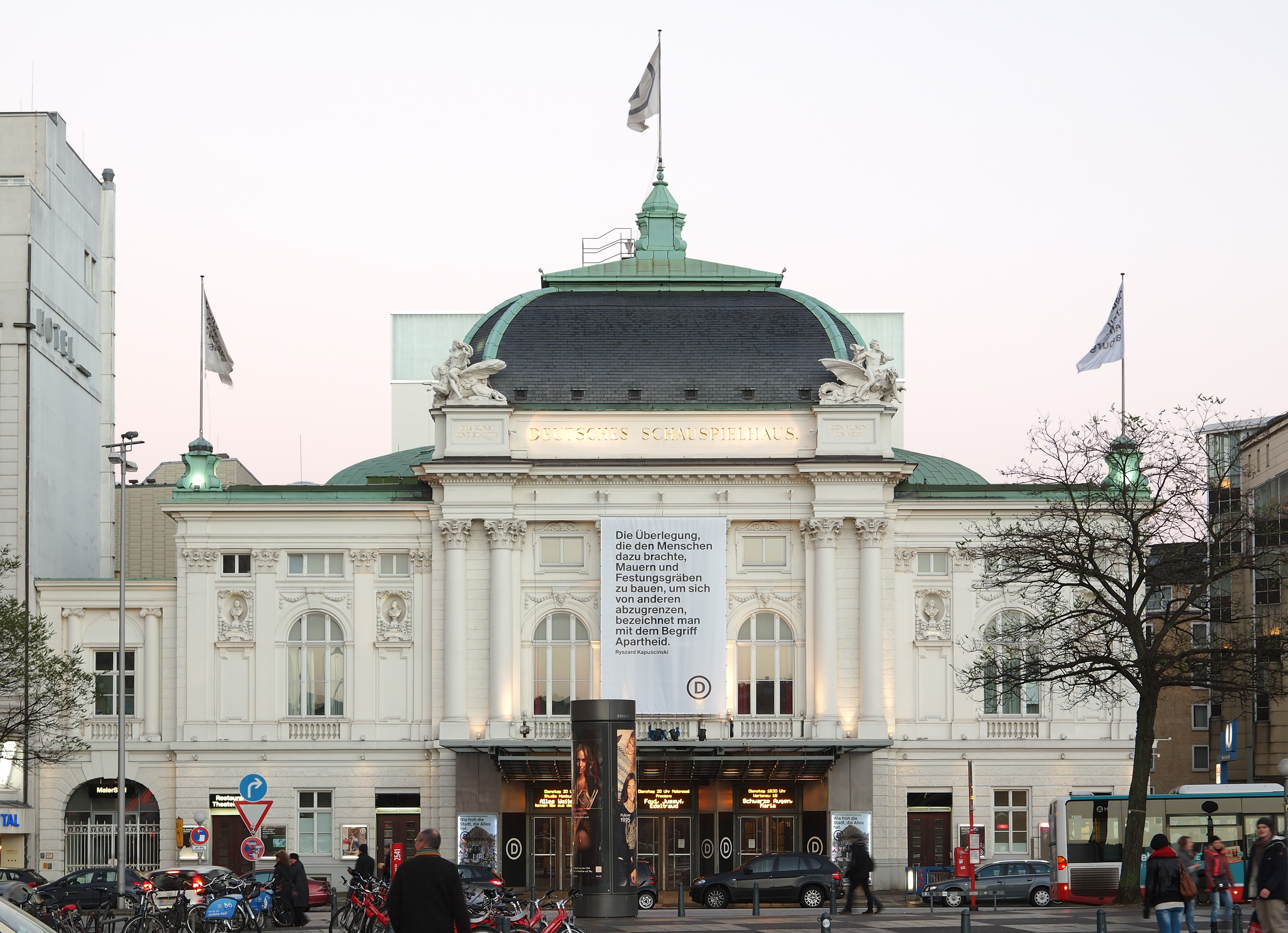 Fassade des Deutschen Schauspielhauses in Hamburg This is the photograph of an architectural monument. It is part of the list of cultural monuments of Hamburg, no. 618